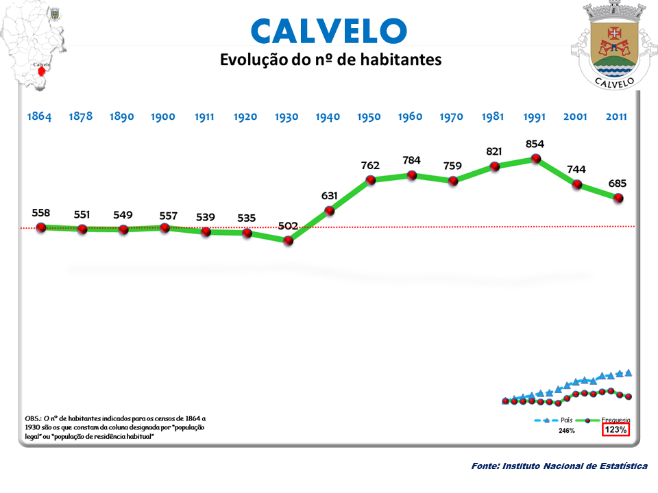 Censos 1864/2011